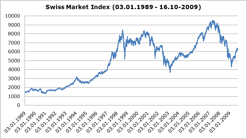 Swiss Market Index (SMI) 30.6.1988-16.10.2009